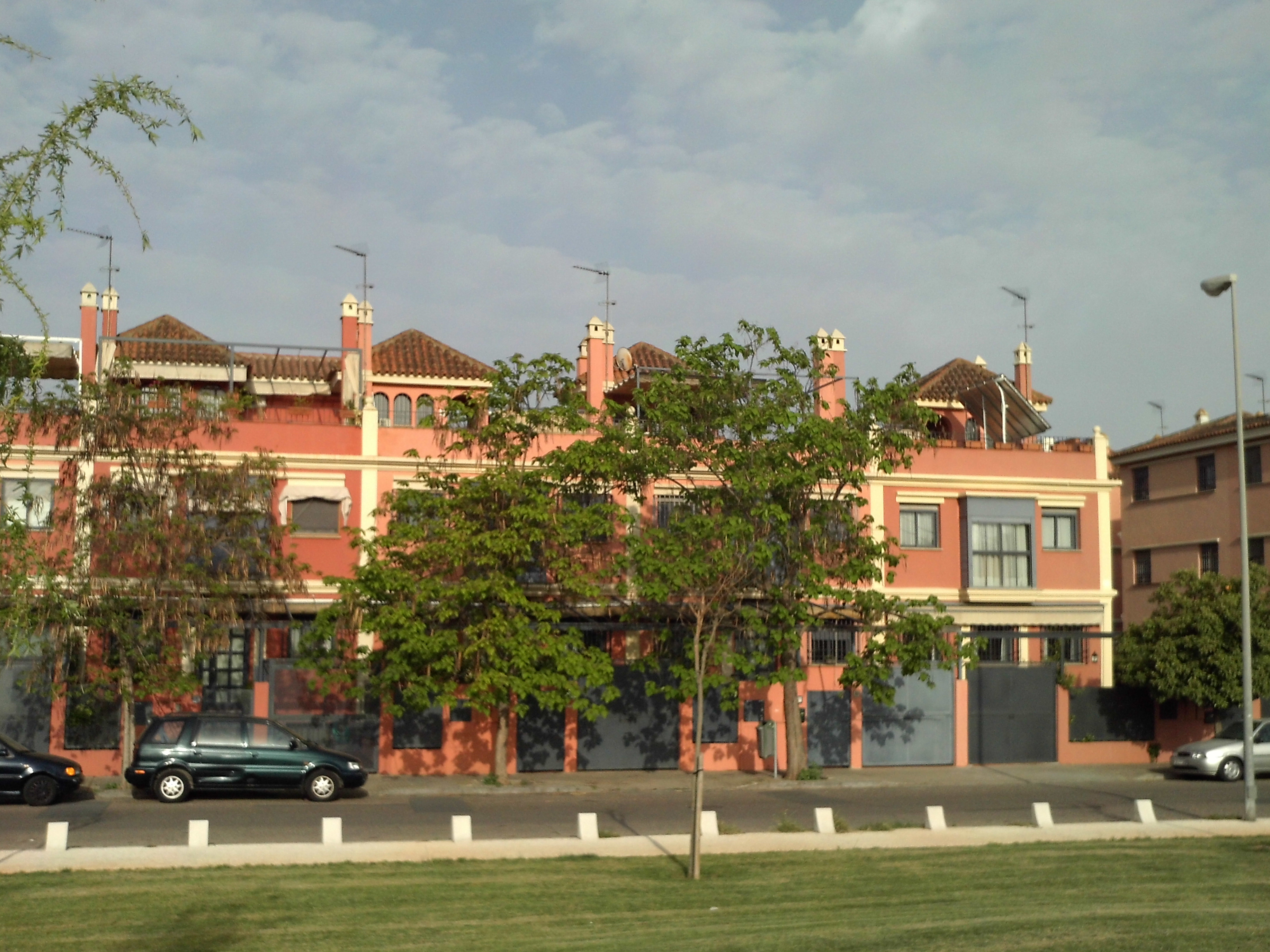 Chalets adosados en el barrio de Los Bermejales, en la ciudad de Sevilla, en una fotografía desde una pradera del parque sobre el antiguo cauce del Guadaíra